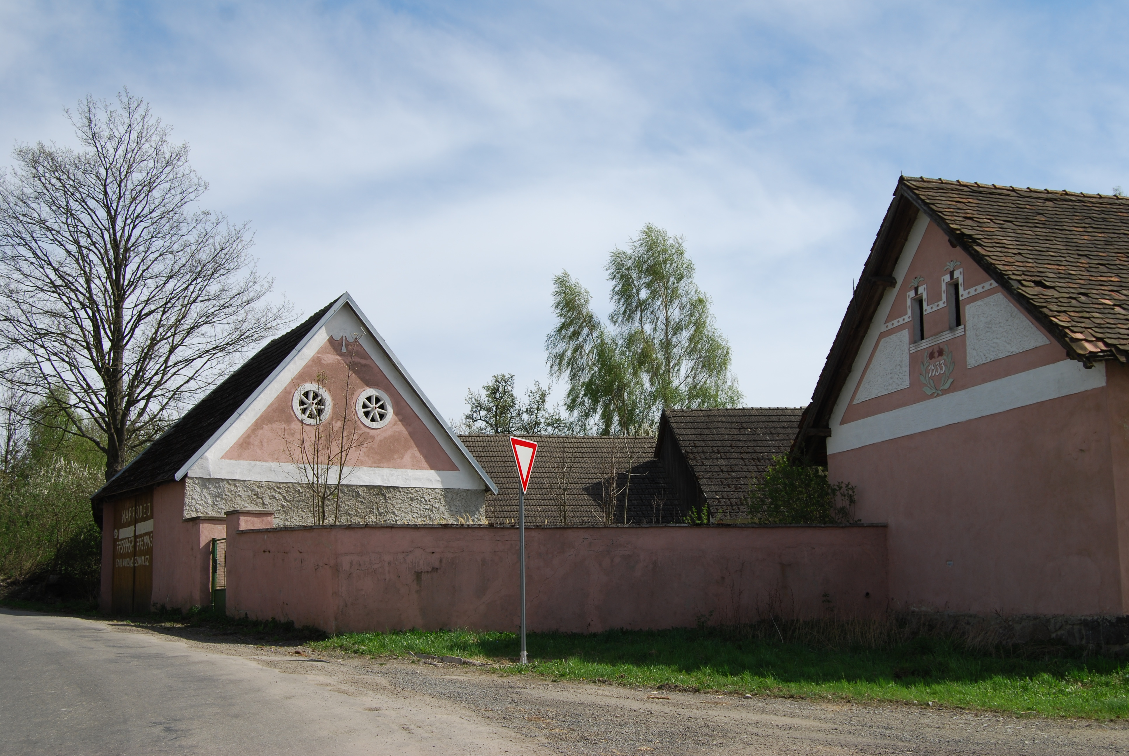 Alenina Lhota je malá vesnice, část obce Jistebnice v okrese Tábor. Česká republika.